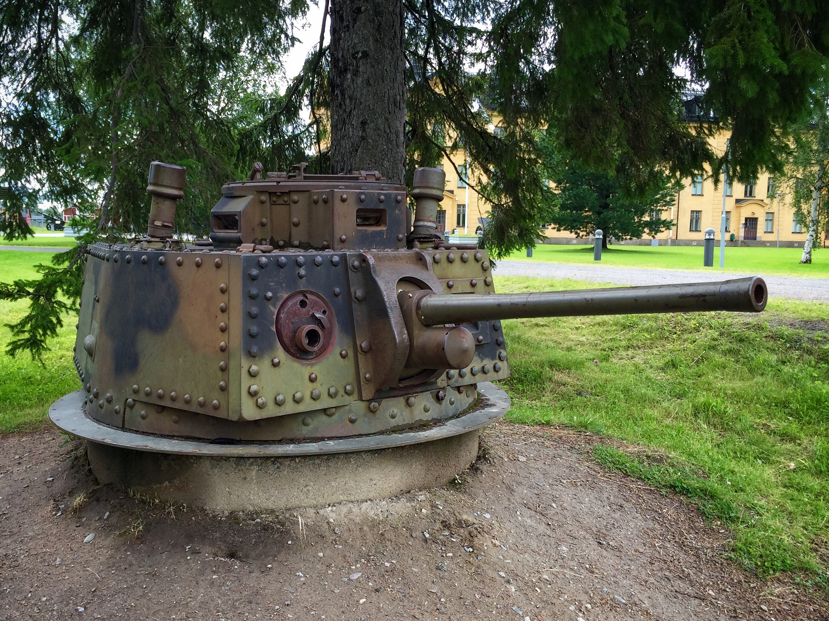 Värntorn 3 (Torn av typ m/41 SII). Uppställd på försvarsmuseum i Boden.